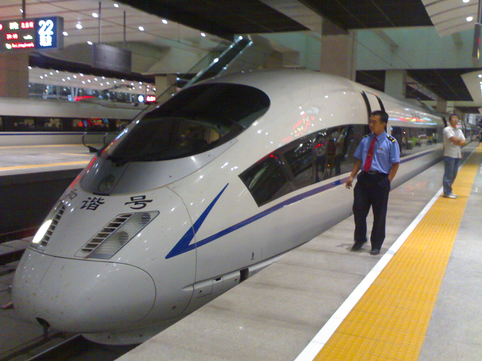 中文（中国大陆）: train3